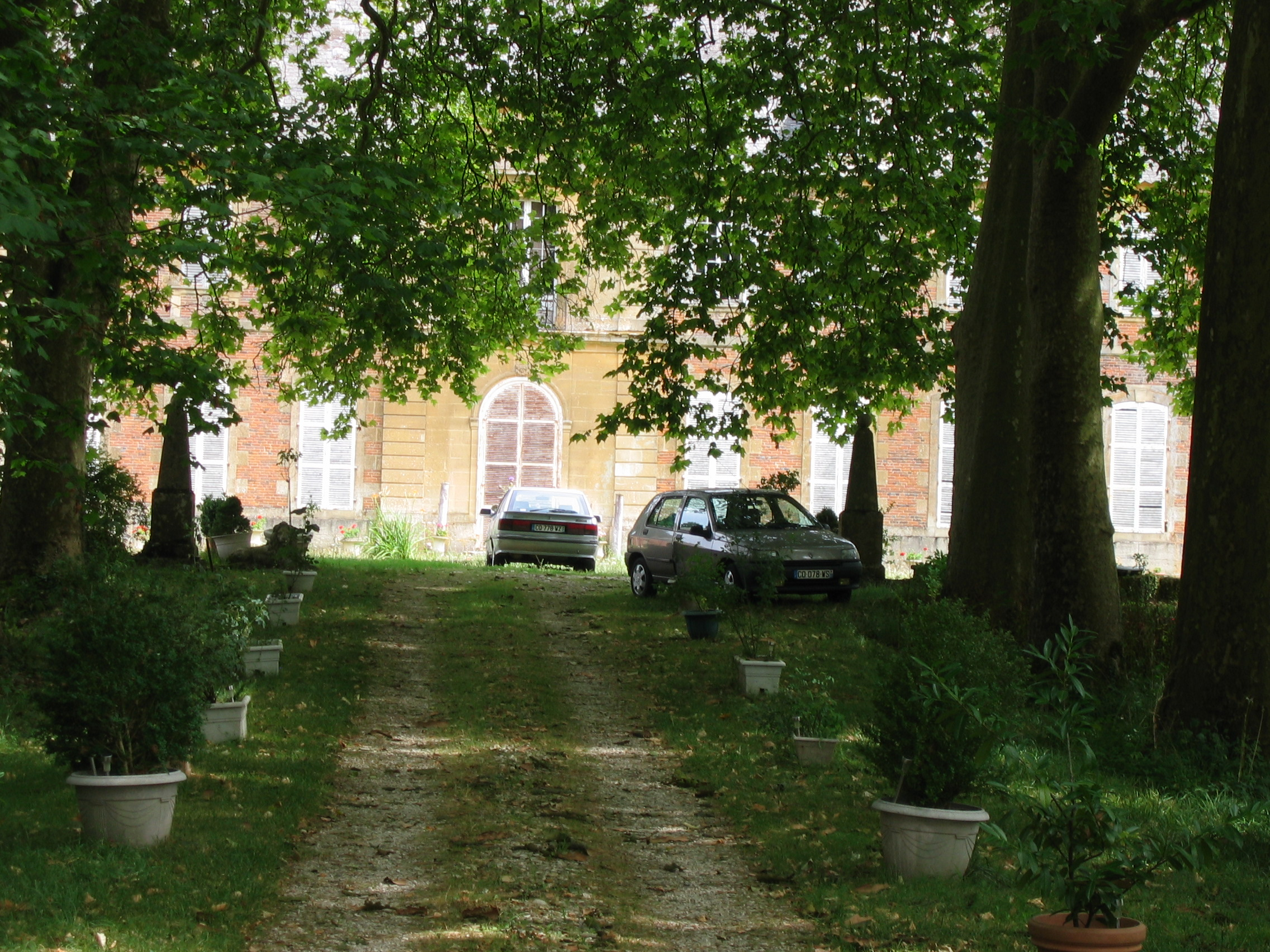 Façade du bâtiment principal